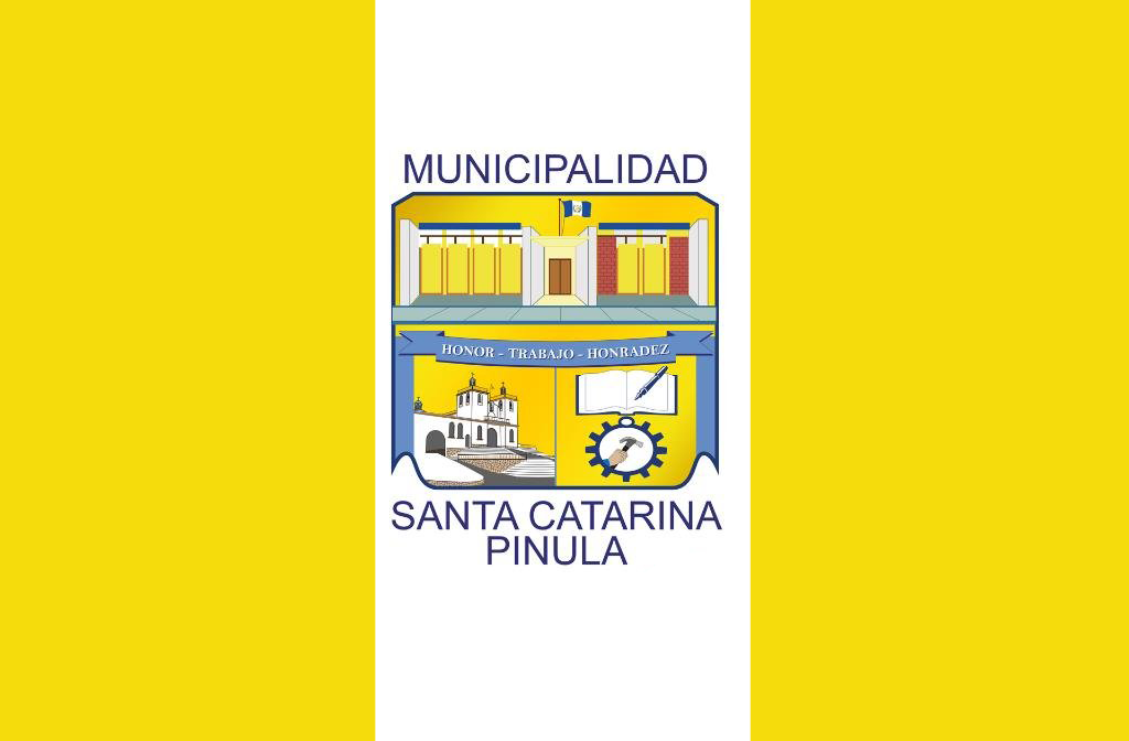 Bandera de Santa Catarina Pinula